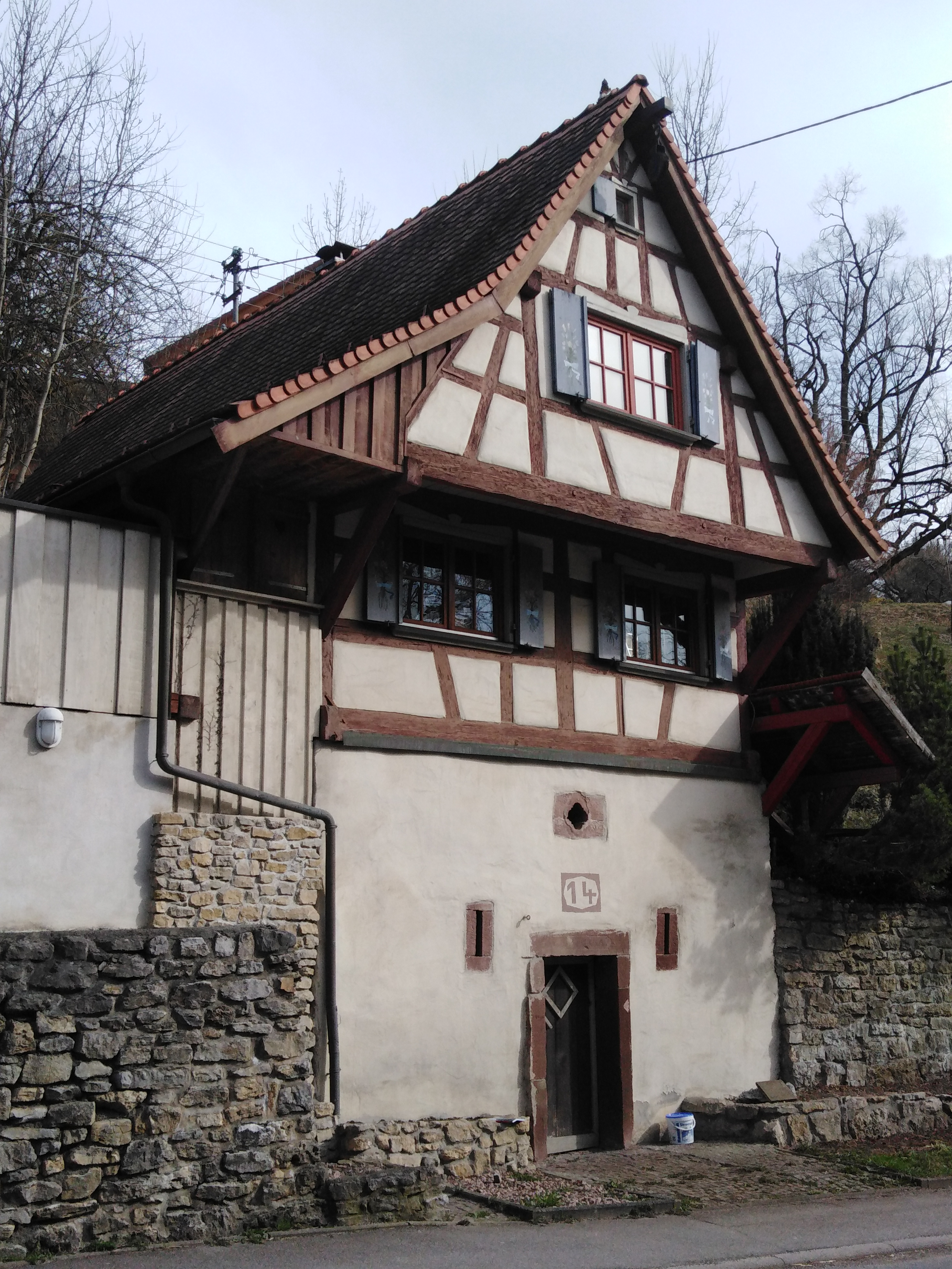 Stetten ob Rottweil, denkmalgeschütztes Haus Lackendorfer Straße 14 (Ende 18. Jh.)